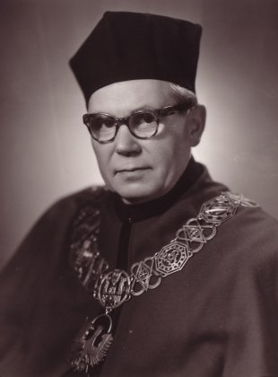 Bronisław Kiepuszewski (ur. 24 lipca 1910 w Łęcznej, zm. 19 listopada 1974 w Poznaniu), profesor Politechniki Poznańskiej, specjalista z technologii maszyn a zwłaszcza obróbki skrawaniem oraz technologii kół i przekładni zębatych.